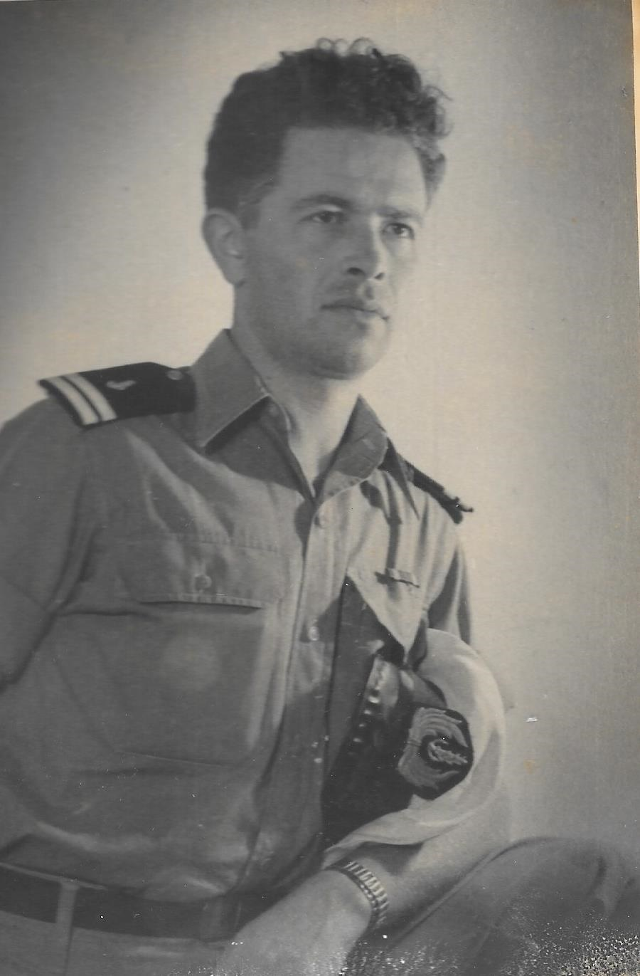 סרן מייק גל בשנת 1956